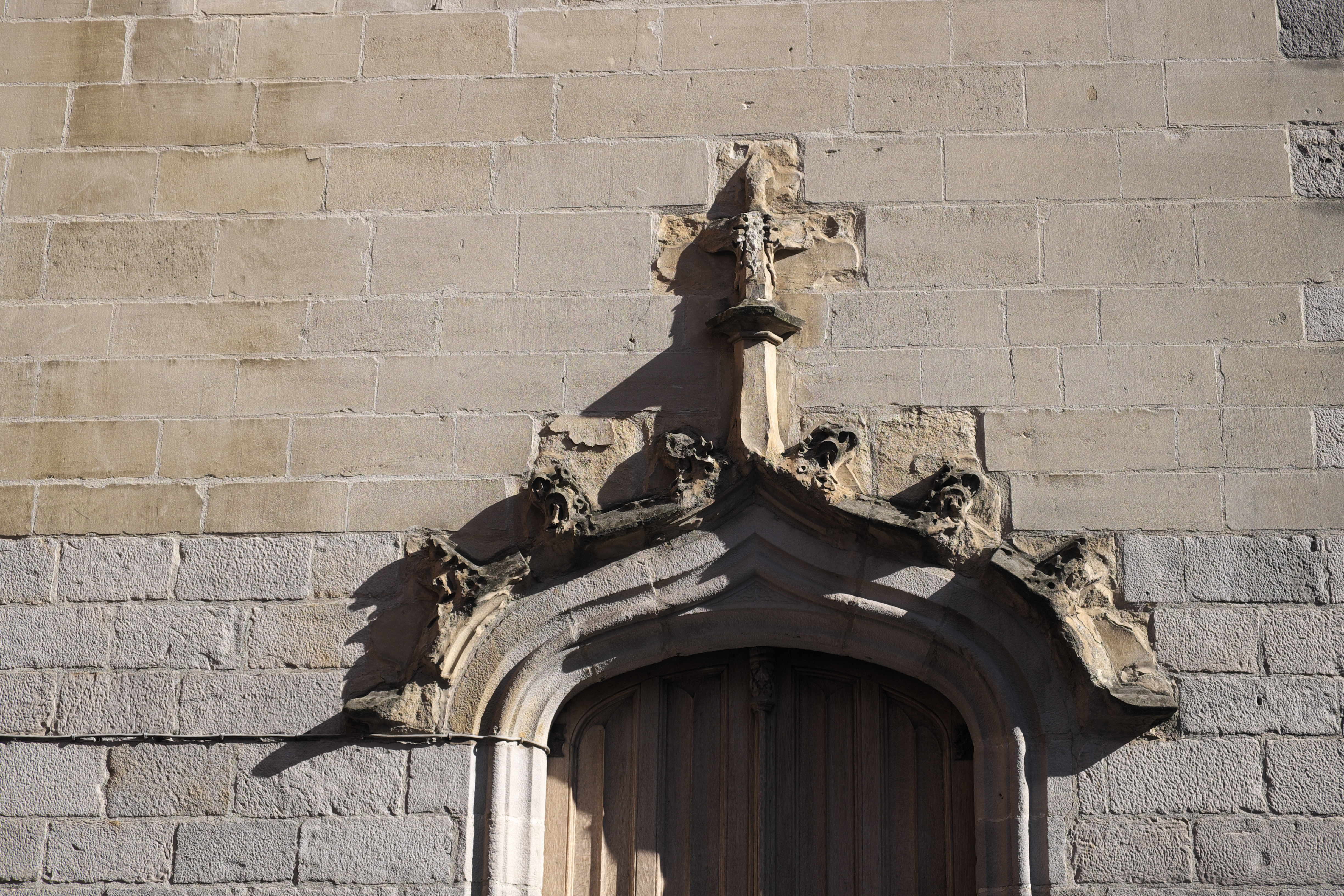 Palais Rihour in Lille im Département Nord (Nord-Pas-de-Calais/Frankreich), Eingangstür mit Kielbogen